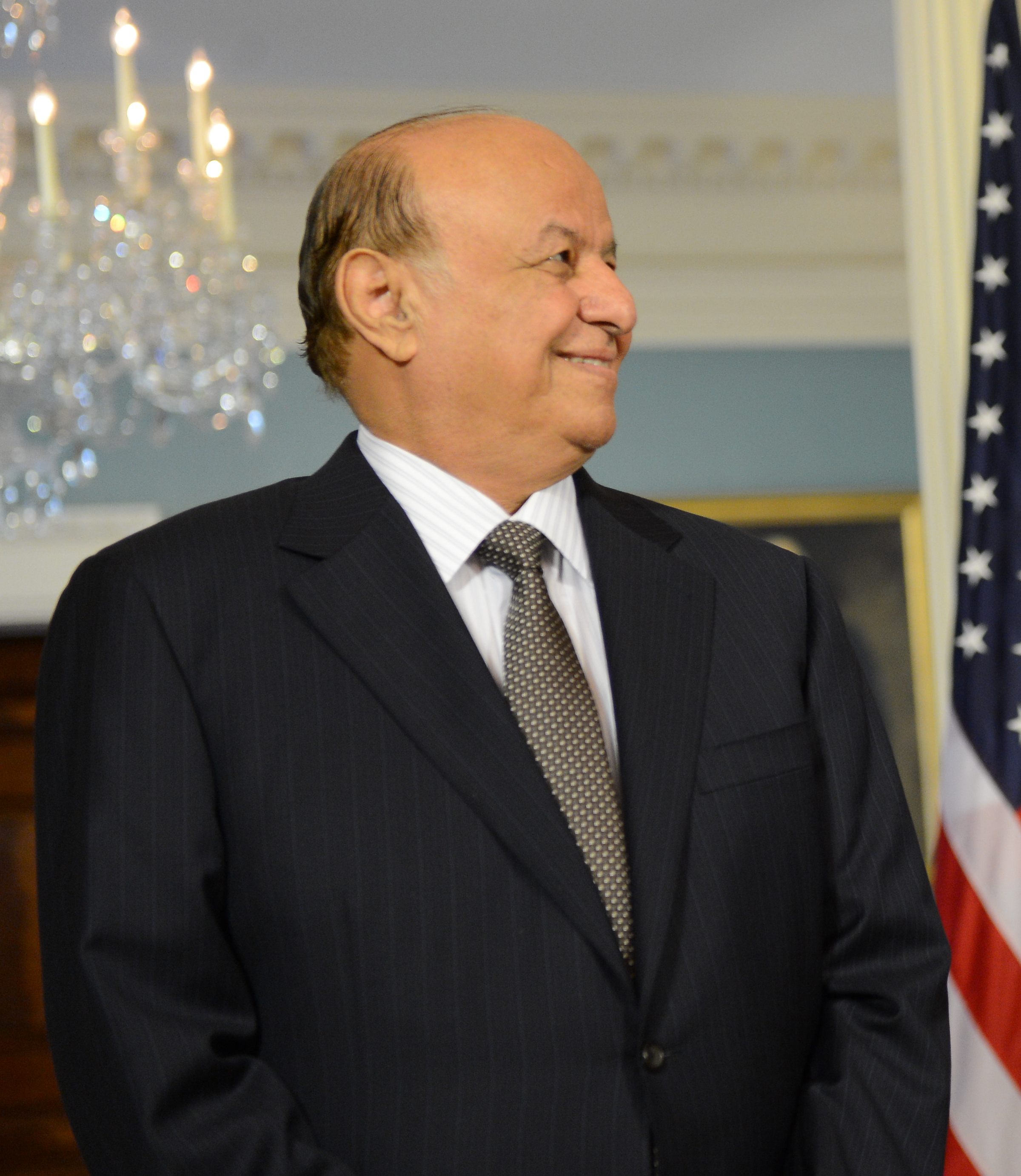 Abd Rabo Mansour Hadi en 2015